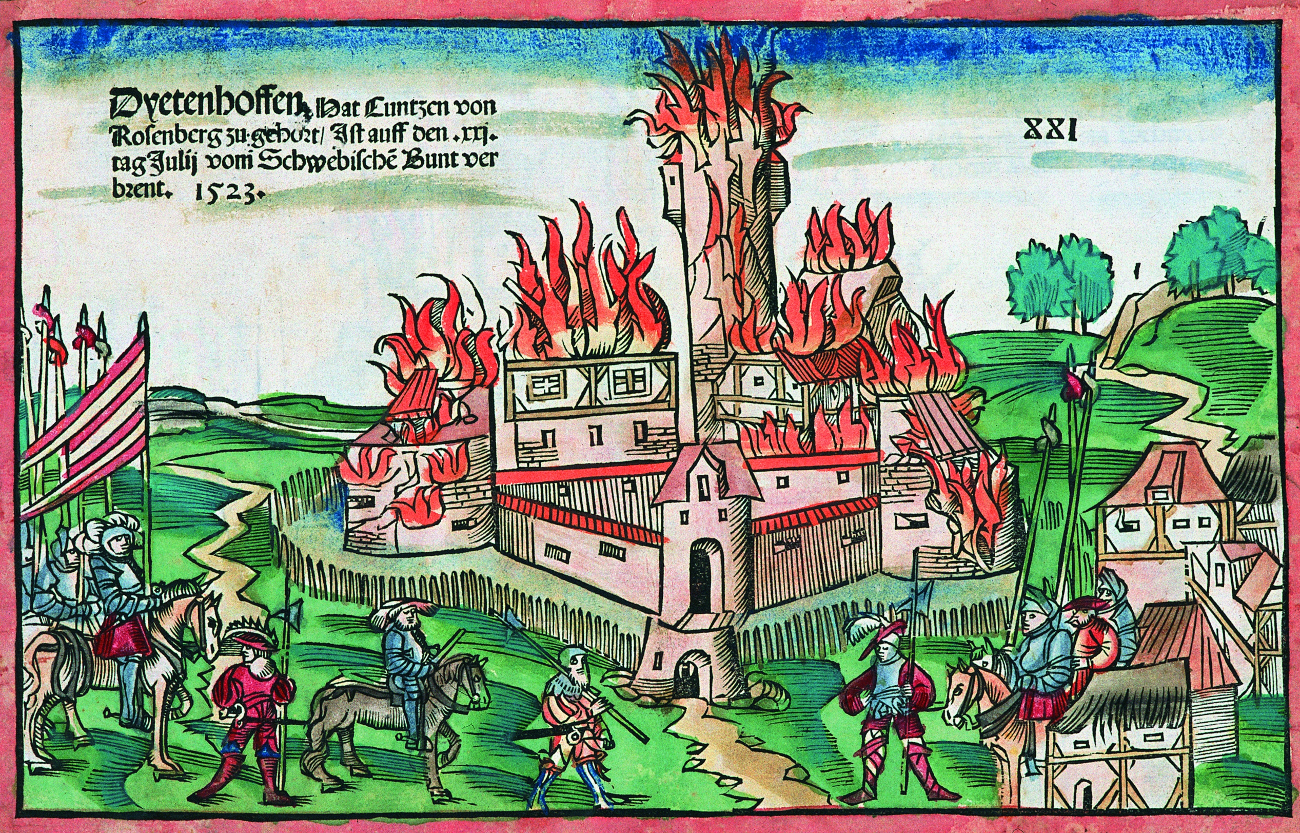 Bild aus dem Burgenbuch der Staatsbibliothek Bamberg, Staatsbibliothek Bamberg, RB.H.bell.f.1